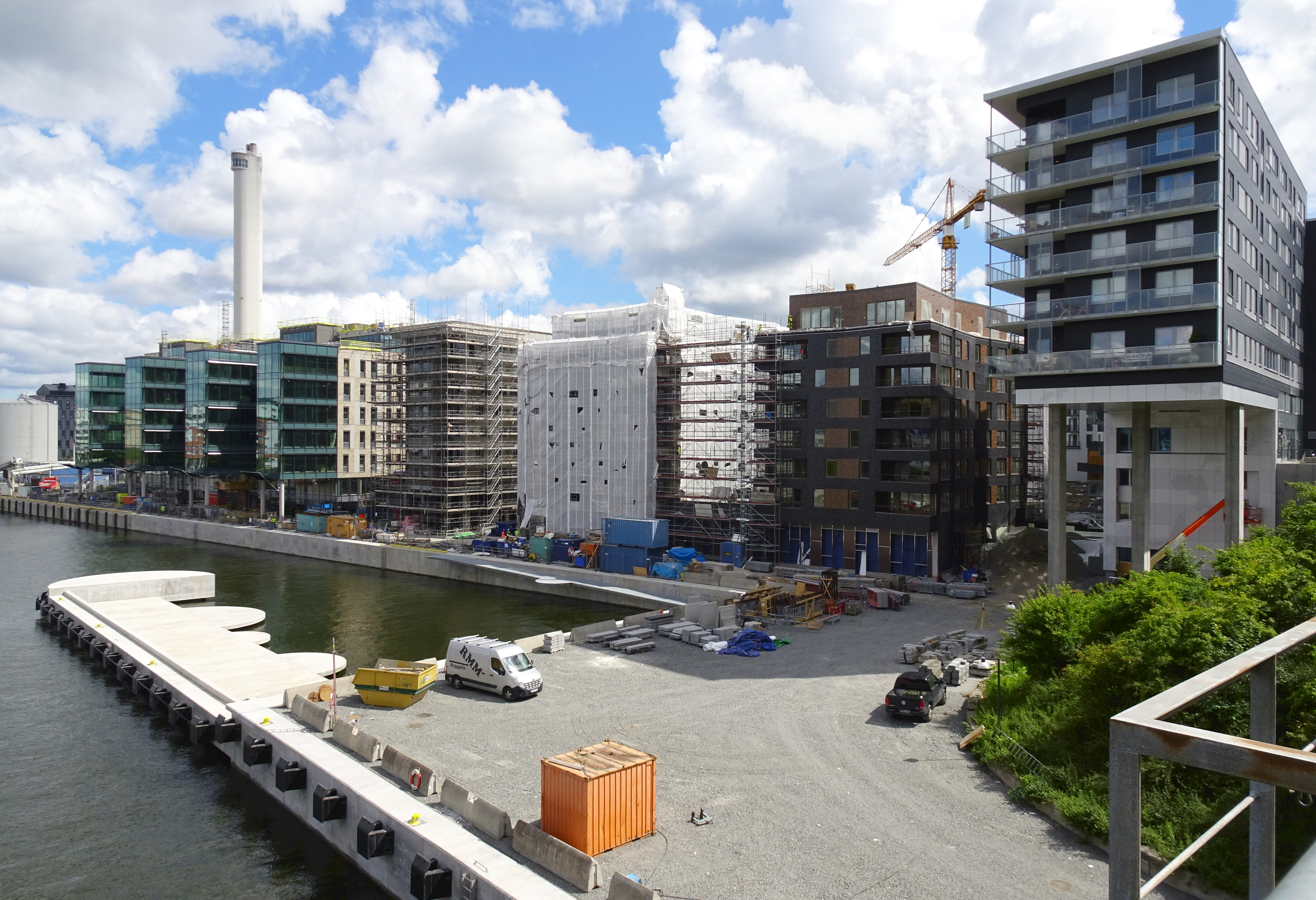 Nya bebyggelsen (Sthlm Seaside) i Fredriksdal tar form